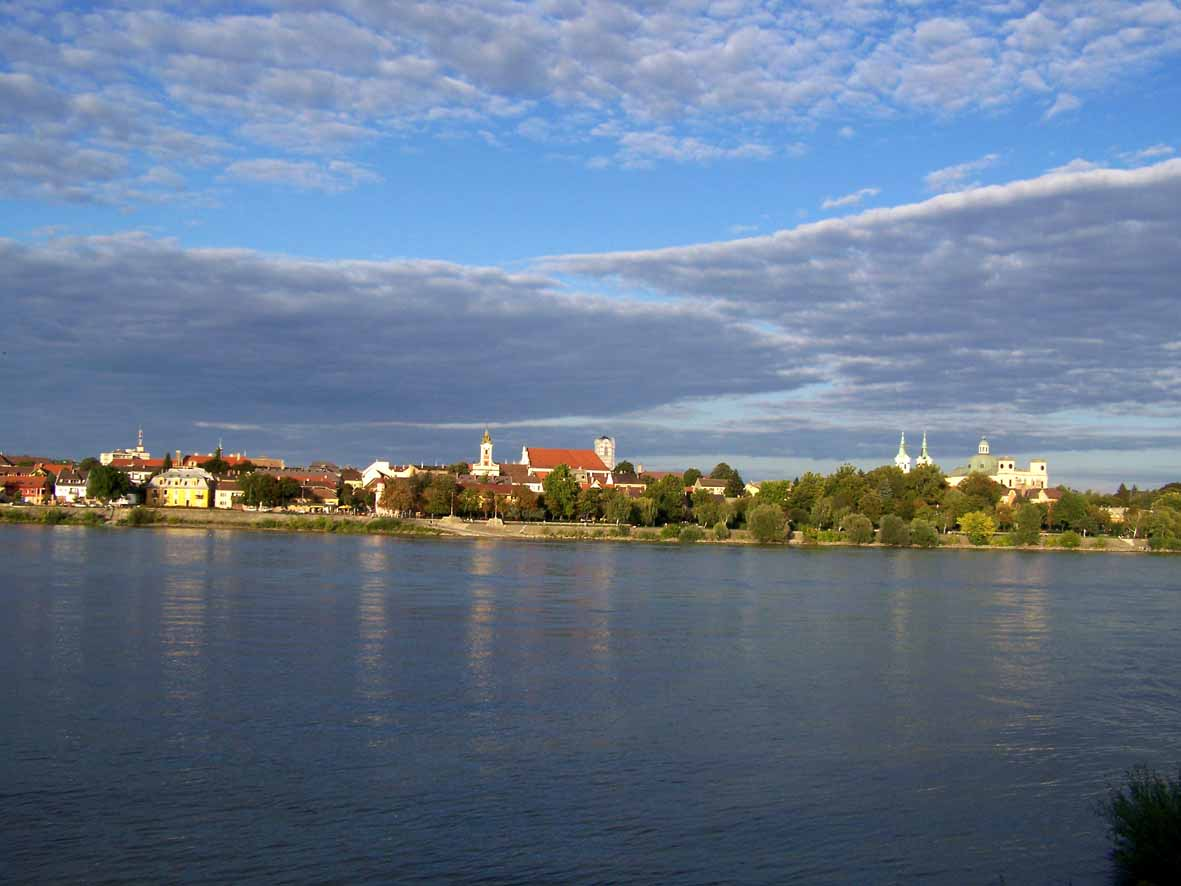 Panorama di Vác dal Danubio